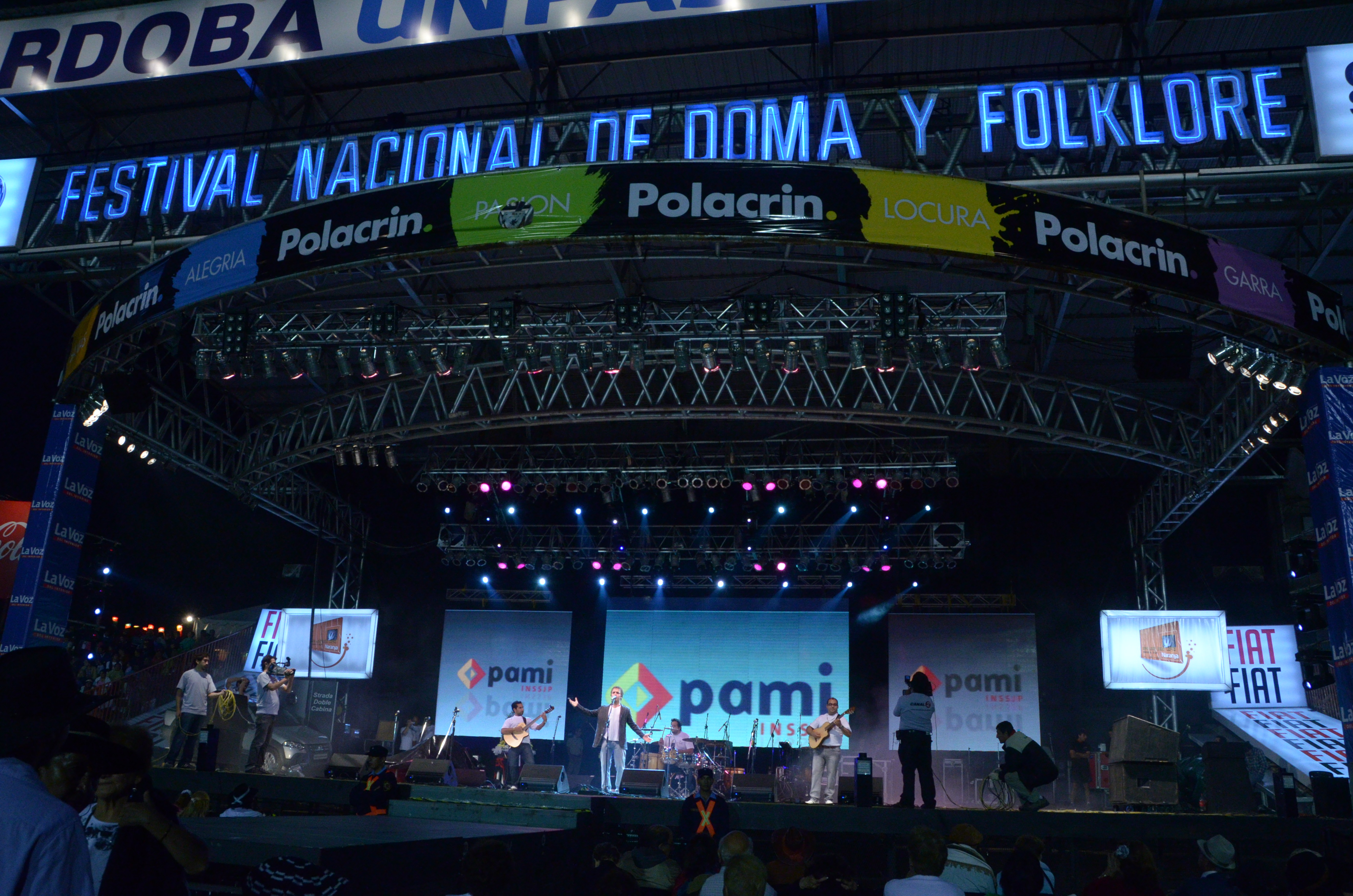 Ivan Coniglio en el 46º Festival de Doma y Folklore de Jesús María 2011.